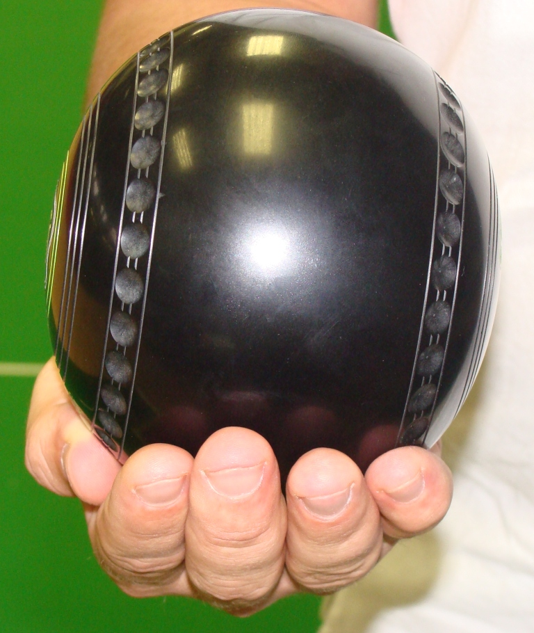 Шар, имеющий сферическую форму. Для игры в Боулз